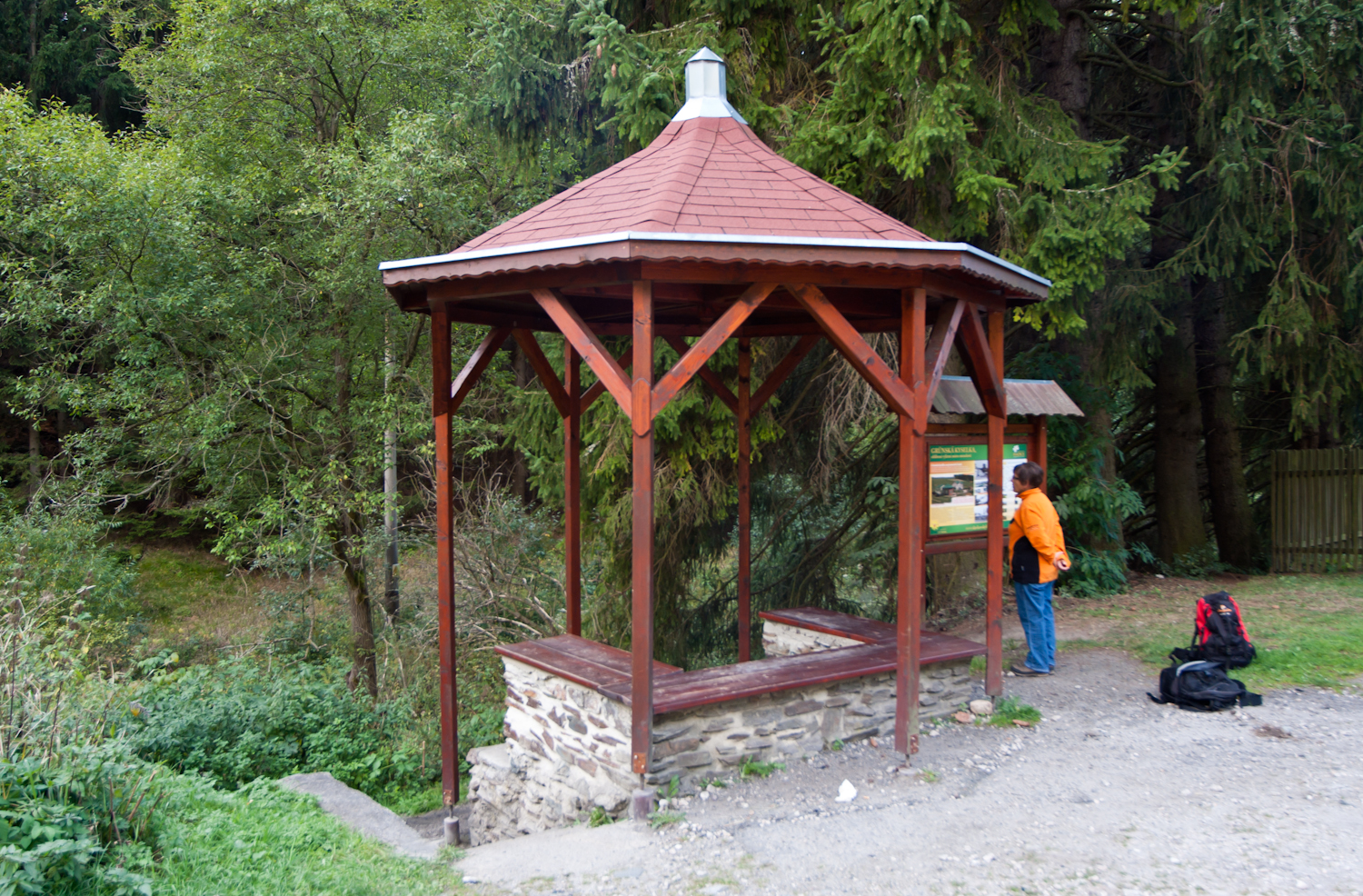 Grünská kyselka, Slavkovský les; více